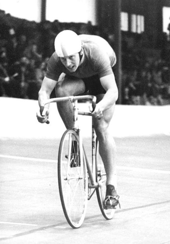 Lothar Thoms ADN-ZB Gahlbeck 26-8-77 San Cristobal-Venezuele: Lothar Thoms Weltmeister im 1000-m-Einzelzeitfahren - Weltmeister in der ersten Entscheidung der Radsport-Weltmeisterschaften 1977 in San Cristobal (Venezela) wurde am Abend des 25.8.77 (Ortszeit) der Cottbuser Lothar Thoms (Foto von einem führeren Werrkampf) im 1000-m-Einzelzeitfahren in neuer DDR-Rekordzeit von 1:04,85 min.